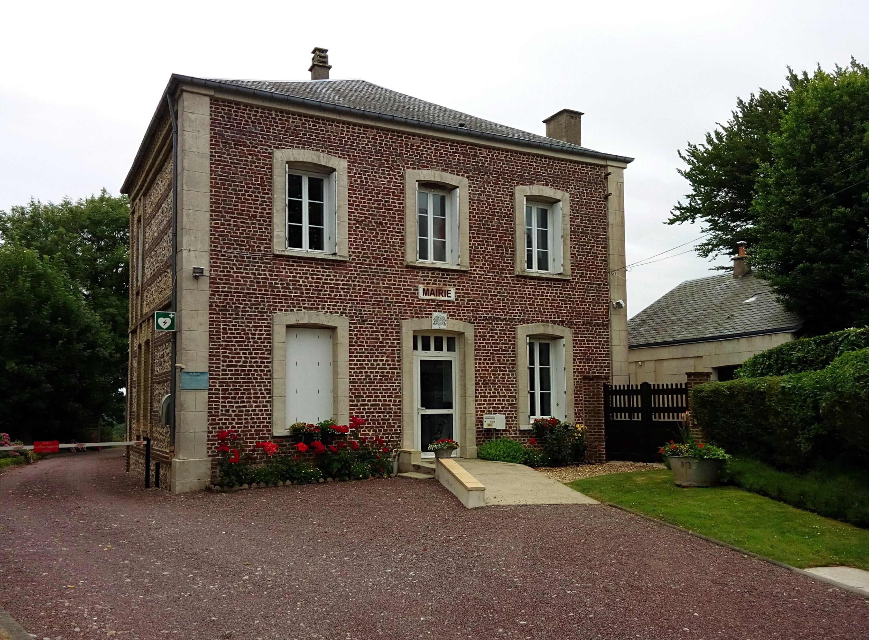 Mairie de Pierrefiques, Seine-Maritime, France.